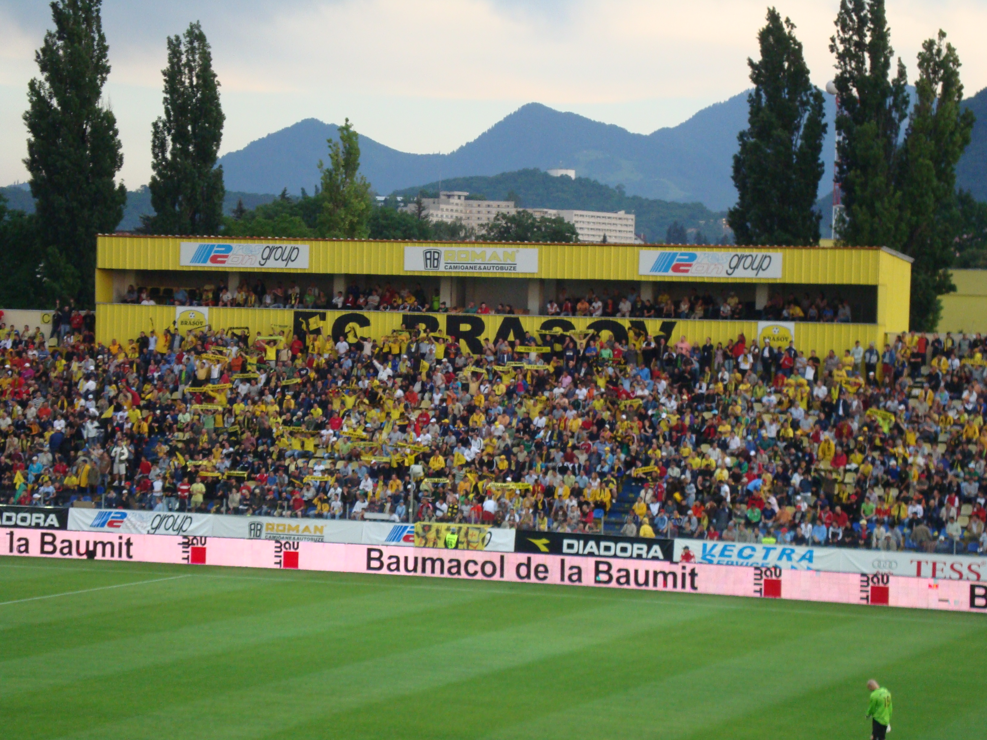 Fani FC Brașov